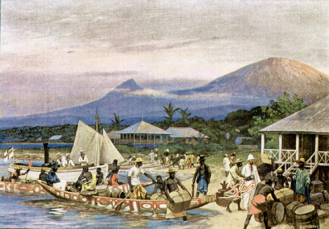 Victoria